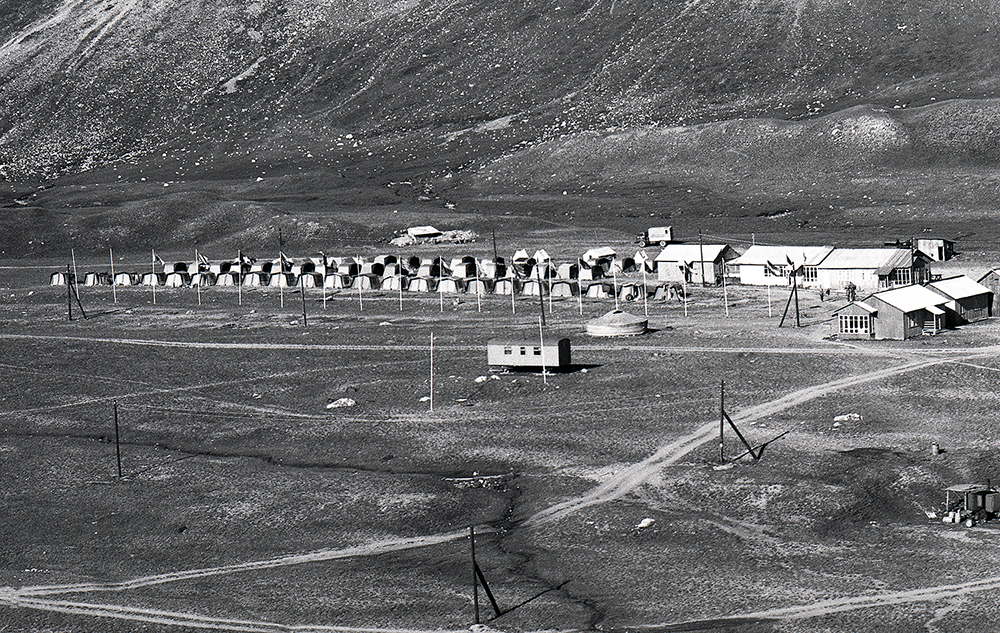 MAL 85 helikopterilt